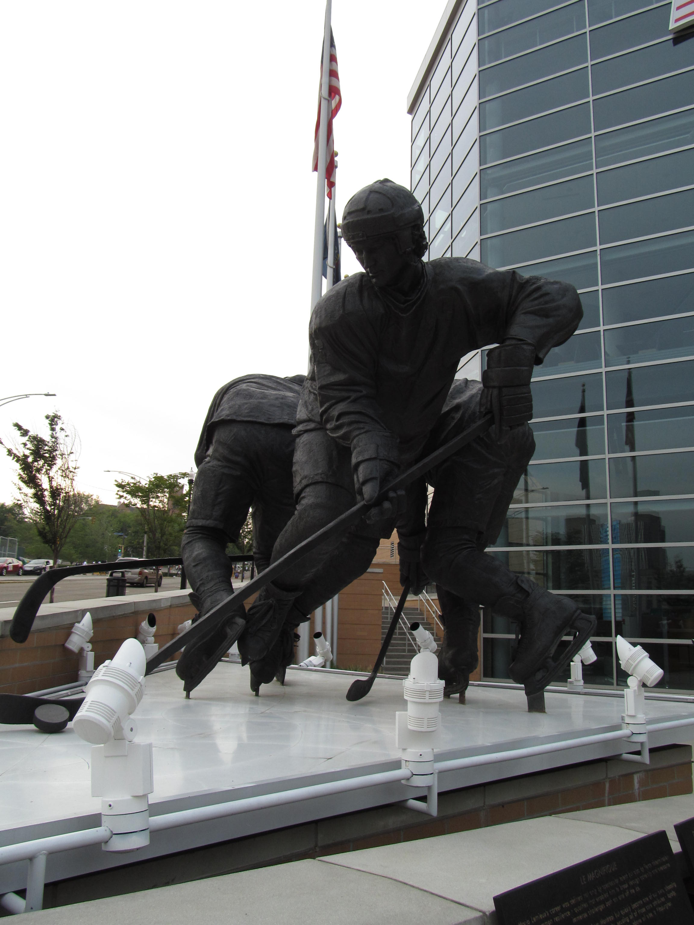 Pittsburgh, Pennsylvania